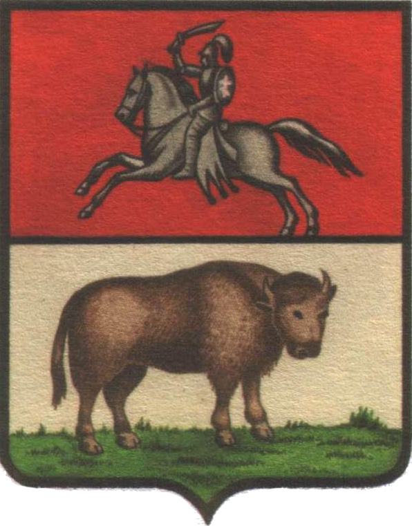 Беларуская (тарашкевіца): Герб Гарадзенскае губэрні (Horadnia) з Пагоняй (Pahonia)